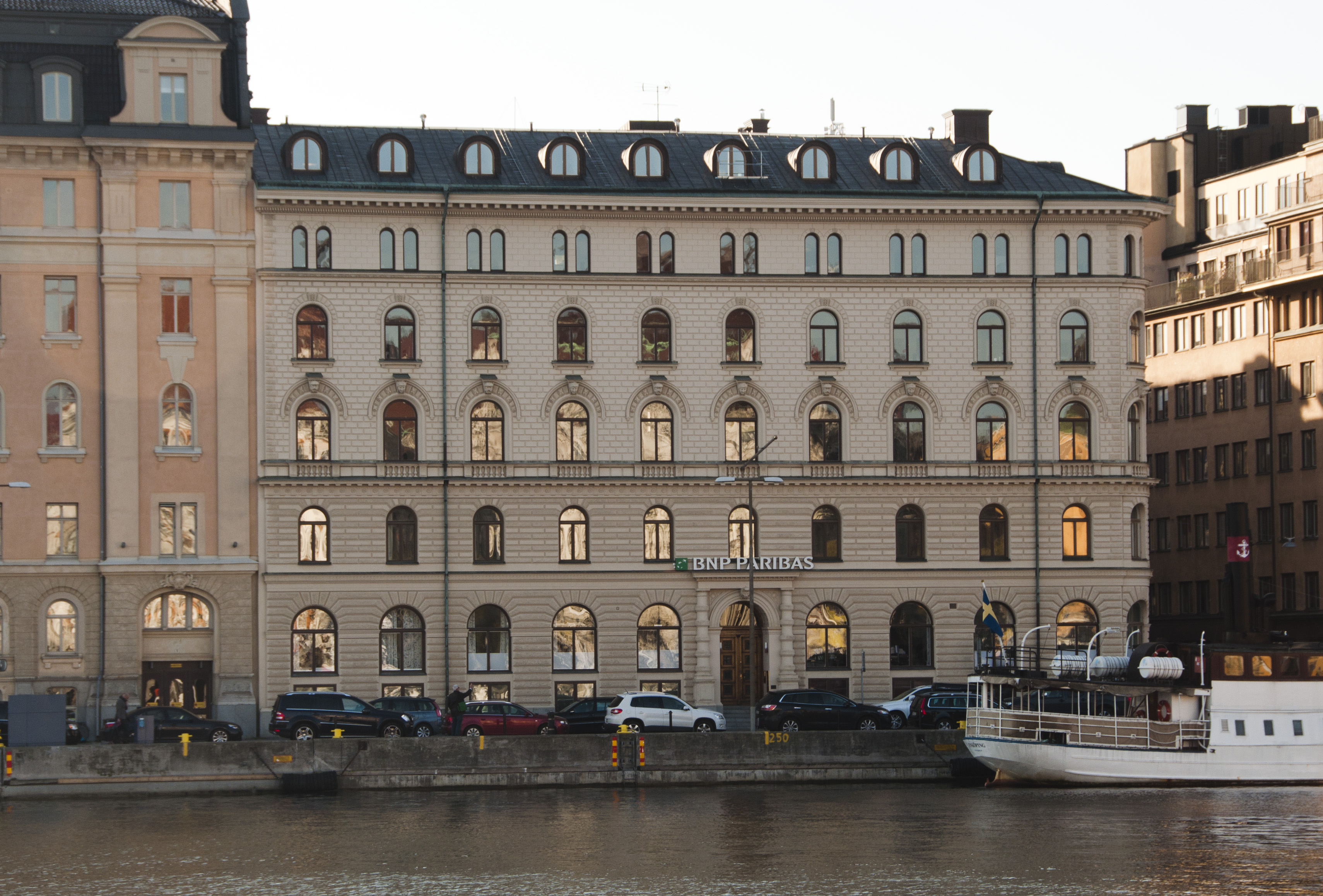 Käpplingeholmen 3, Nybrokajen 5. Byggnadsår 1880-81, arkitekt Adolf Emil Melander, byggherre W A Ekengren.